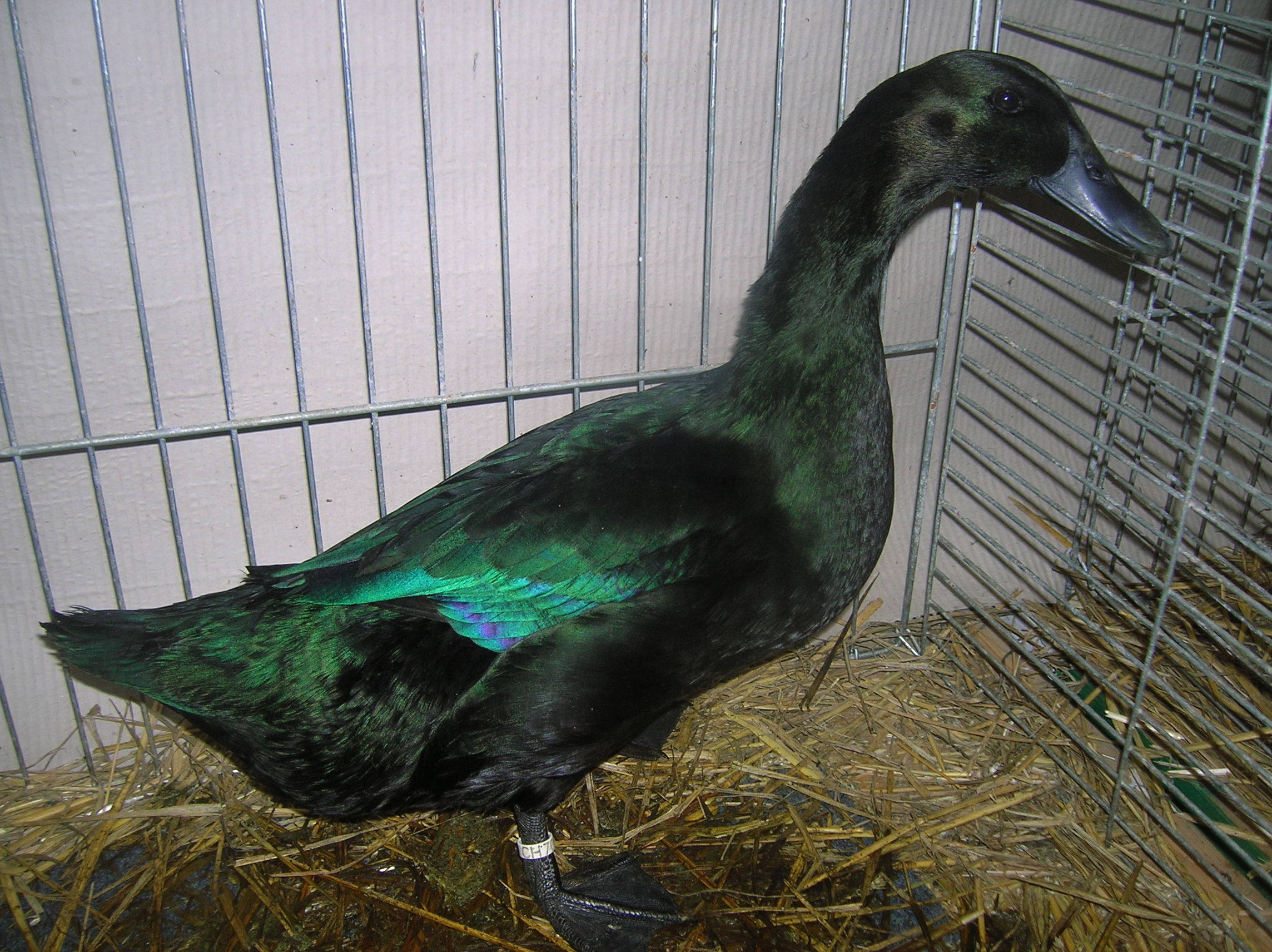 Femmina di Anatra Cayuga/Cayuga Duck/Cayuga Ente.